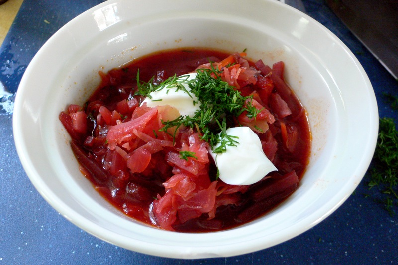 Borscht, a vegetable dish.